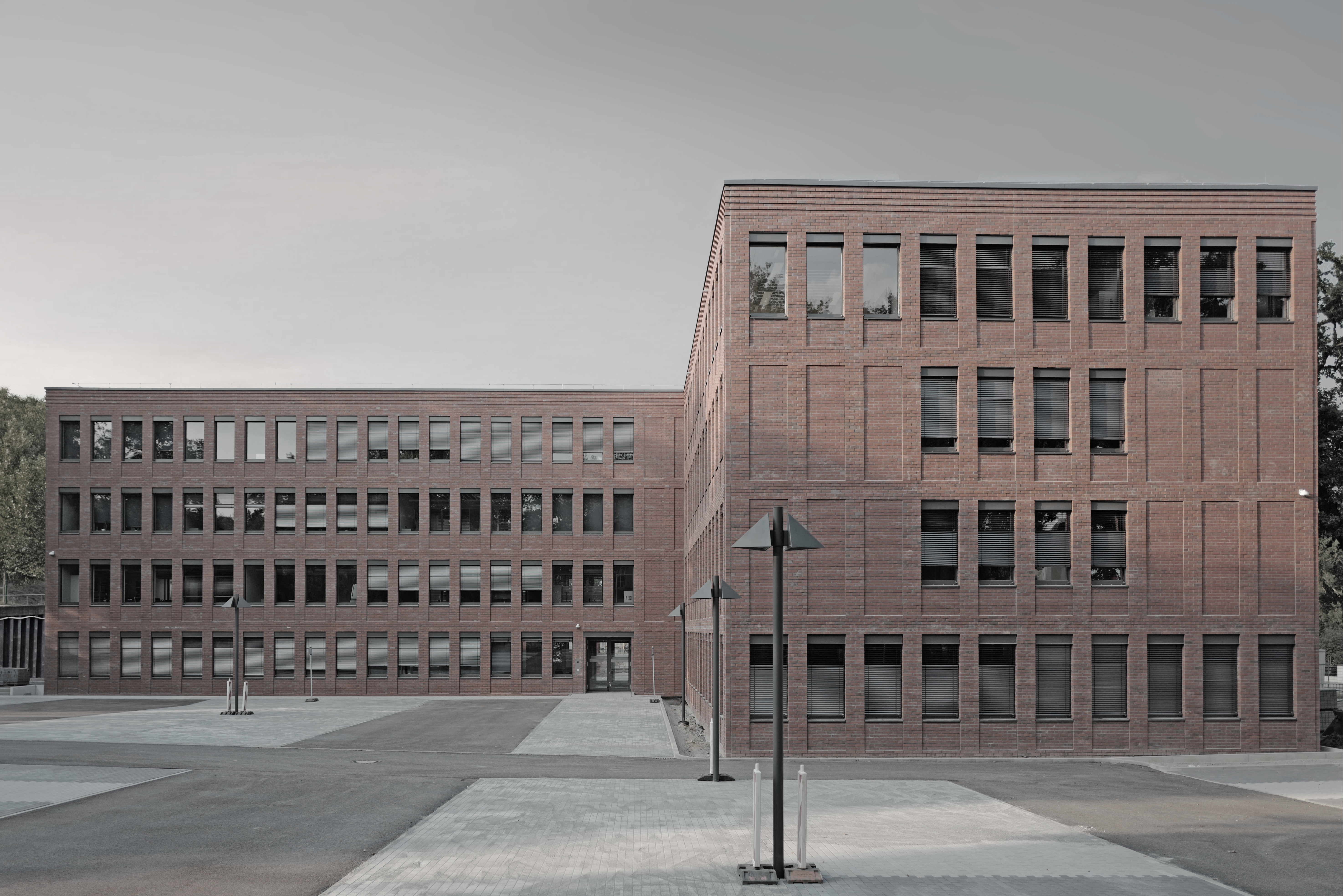 Ziegelensemble am Brauereiberg